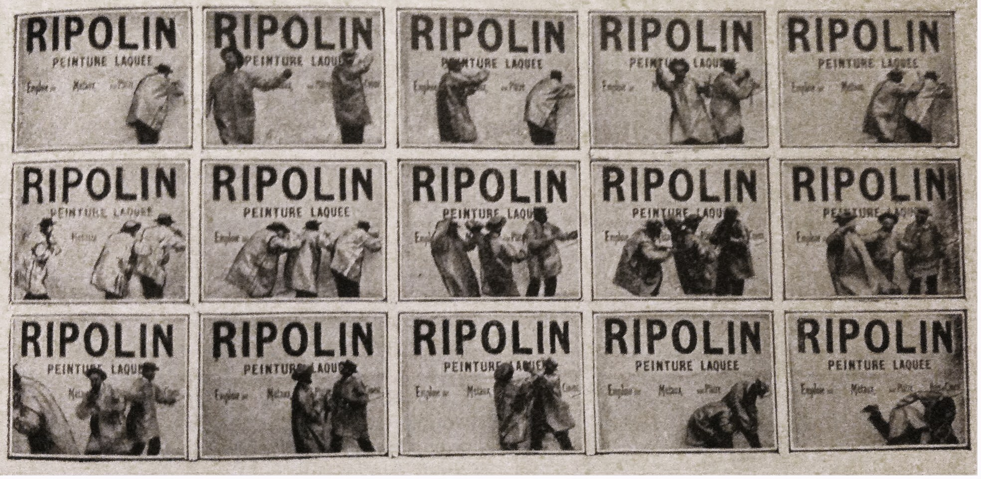 Photogrammes du premier film publicitaire exécuté en octobre 1898 à Paris par Félix Mesguich pour le compte de la Agence nouvelle de publicité (ANP). Marque : Peinture laquée Ripolin. From : Lectures pour tous, année II, Paris, Hachette et Cie, page 355, [1899]